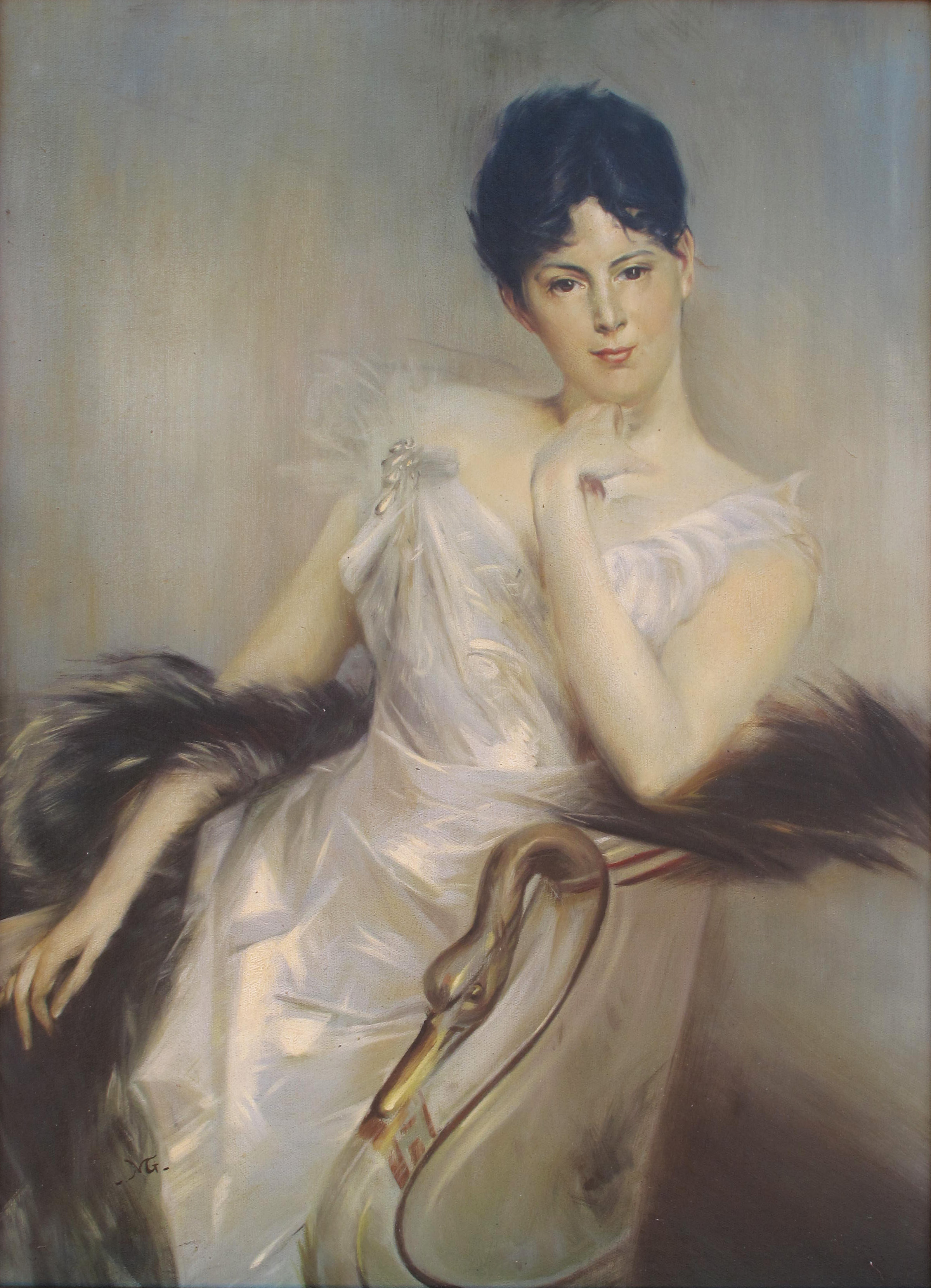 Ritratto alla Contessa Anna Maria Rombo Morosin, siglato MG in basso a sinistra, dipinto ad olio su tela realizzato intorno al 1903.